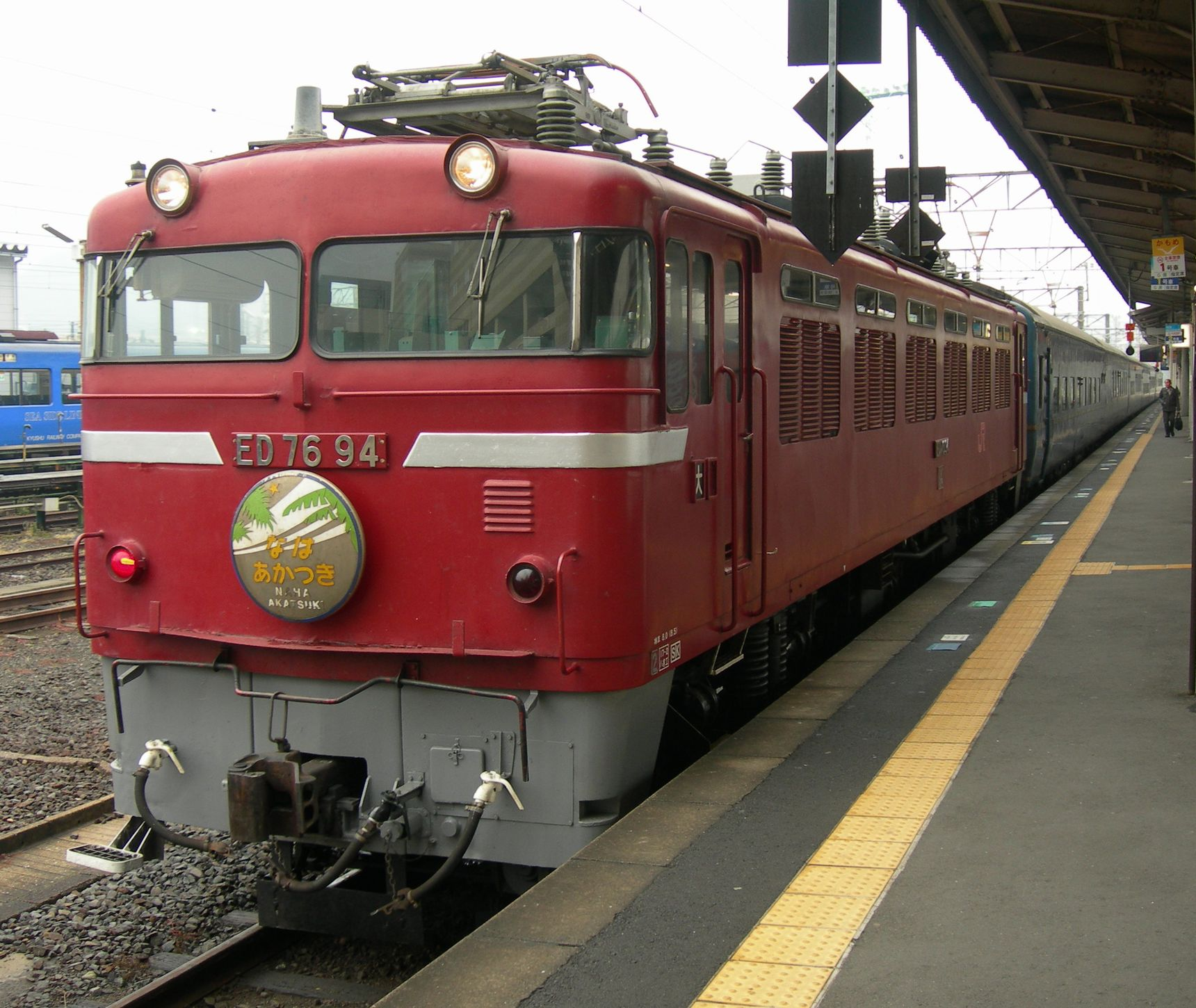 寝台特急なは・あかつき ED76-94